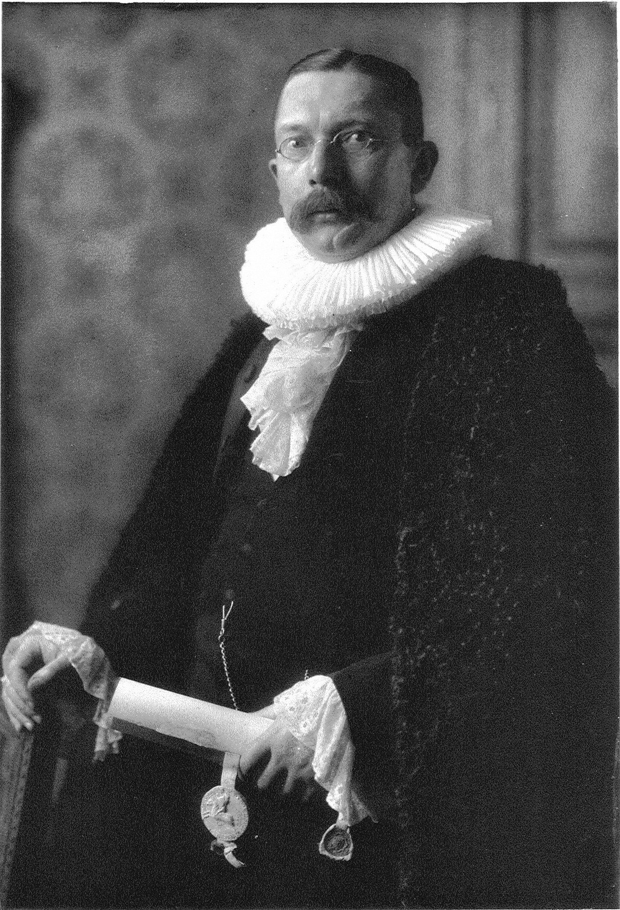 Anton Hagedorn (1856–1932), Historiker und Hamburger Staatssekretär